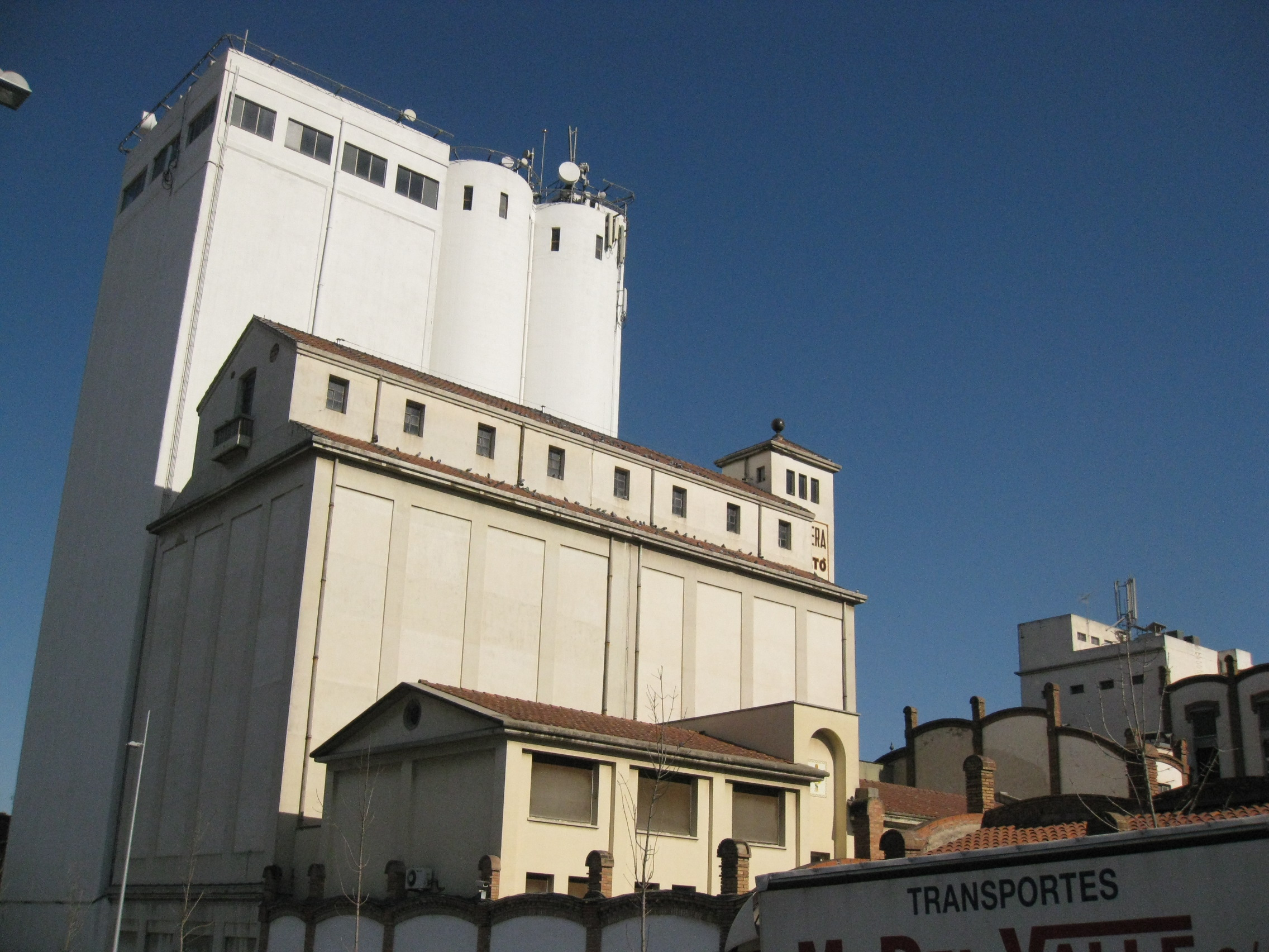 Farinera Moretó (Mollet del Vallès)